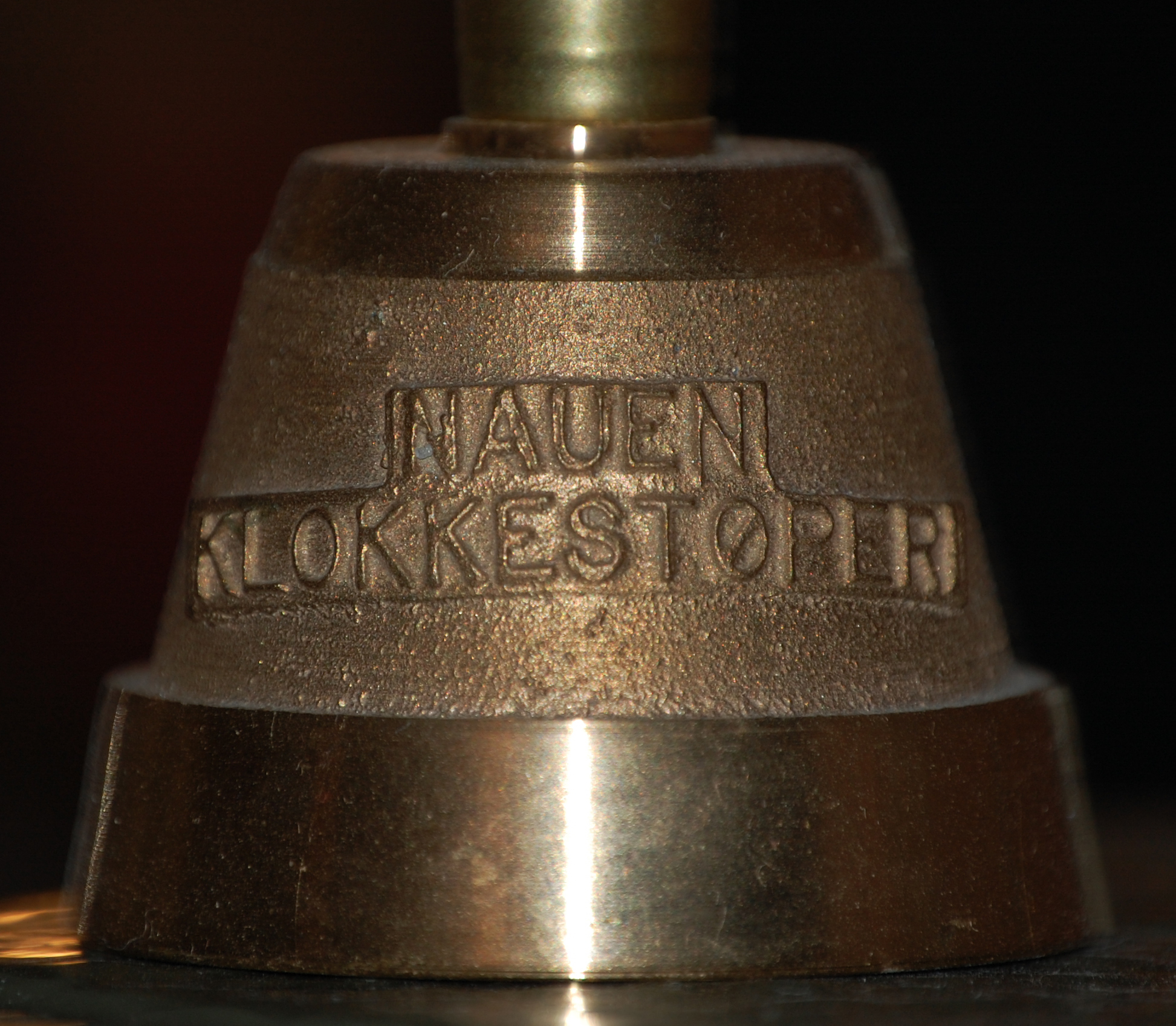 Klokke fra Olsen Nauen klokkestøperi, Tønsberg